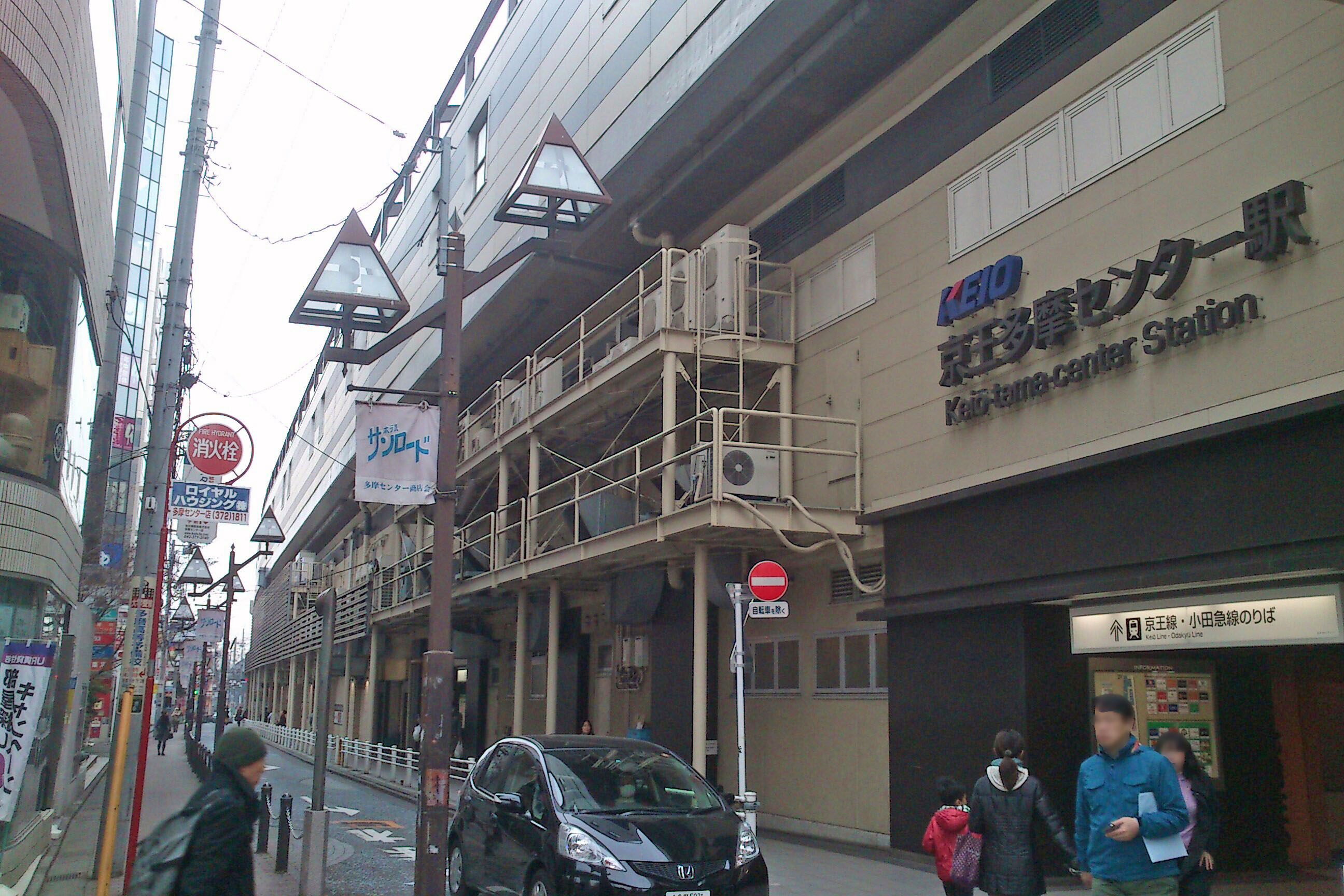 多摩センター駅北口（2014年1月25日）